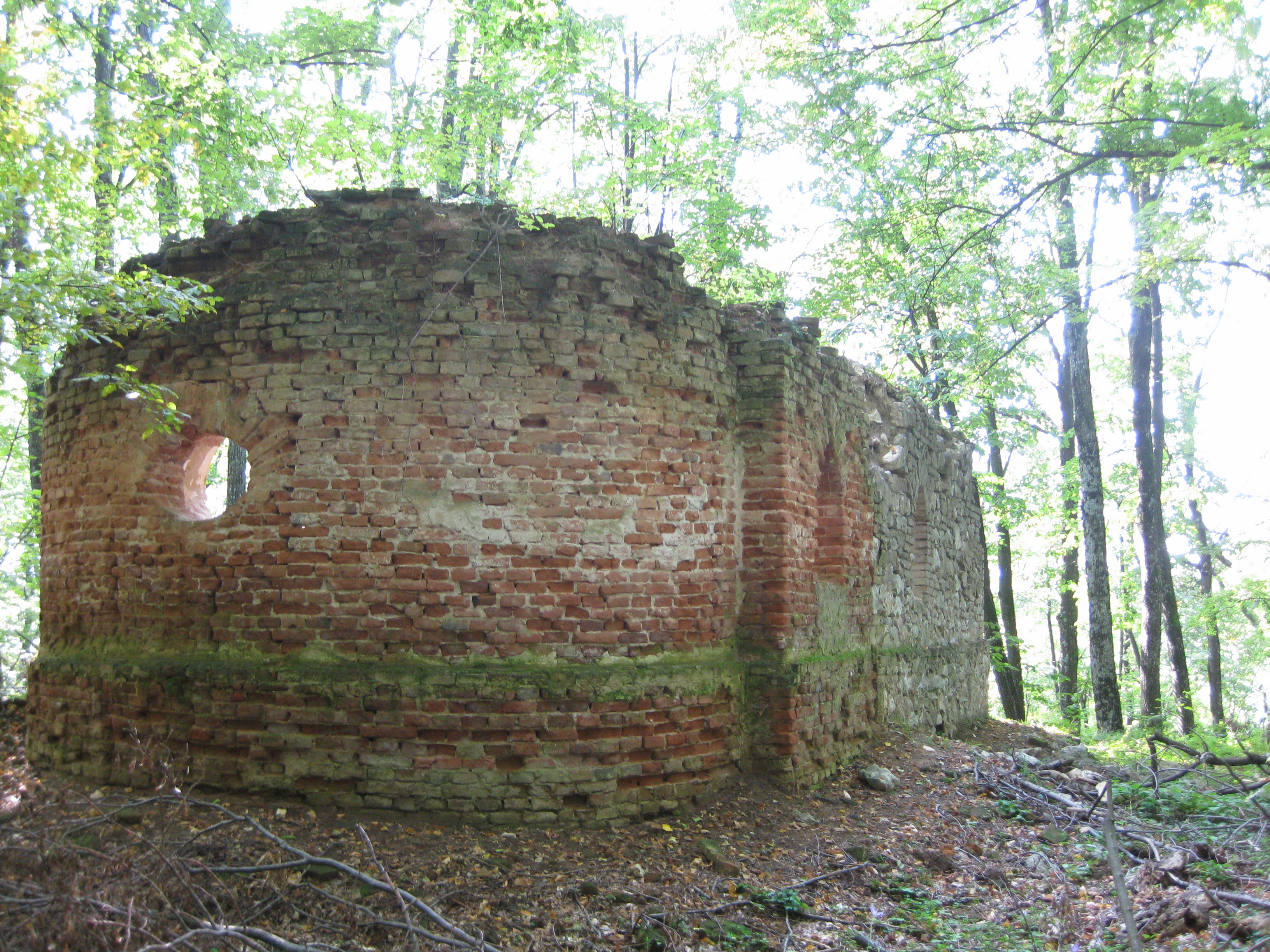 gyulakúti Lázár Annának és két fiúgyermekének kápolnája Sólyomkő váránál (Élesd, Bihar megye, Románia)